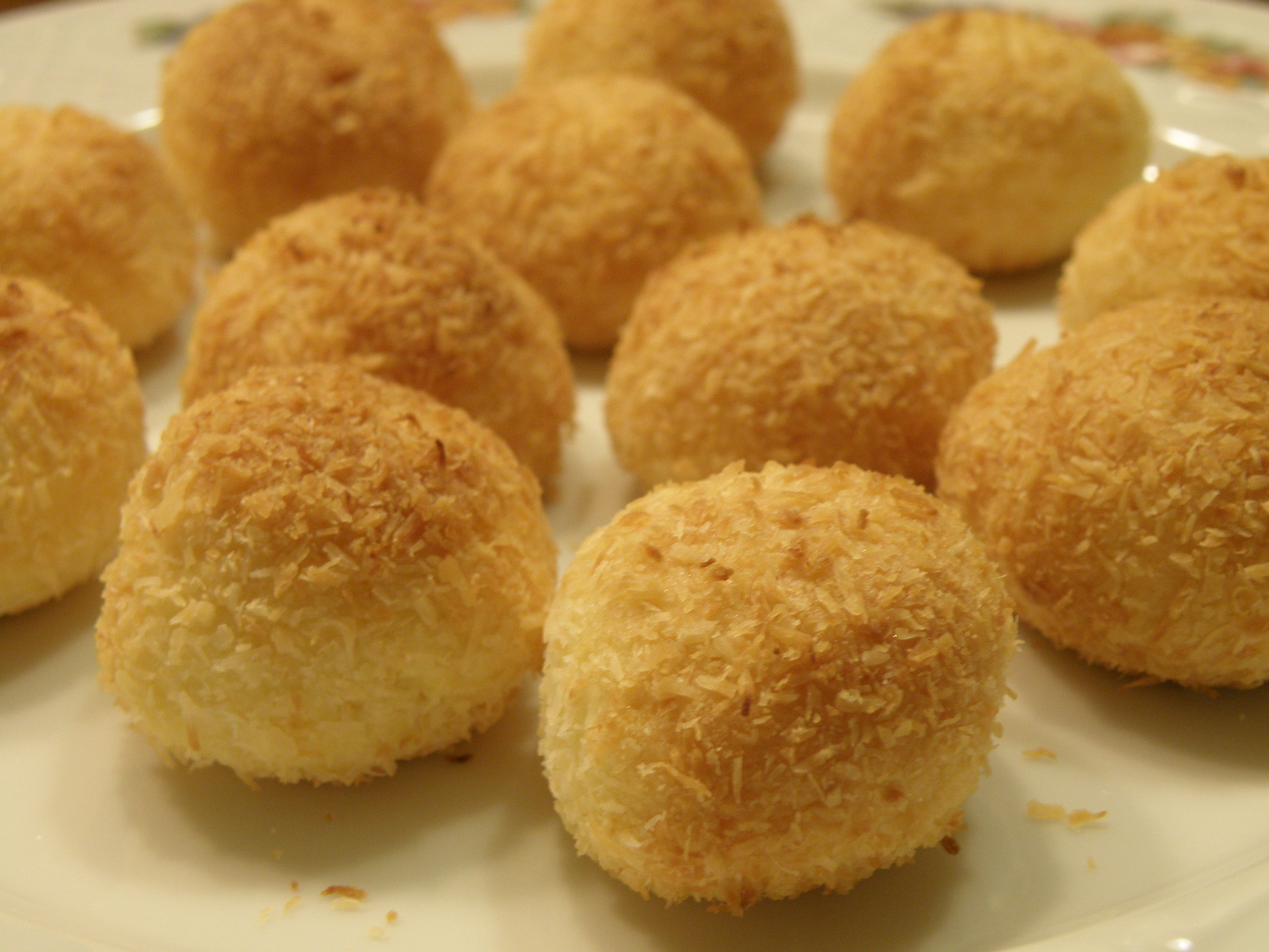 Cocadas, sobremesa típica de Ferrol, Galiza.